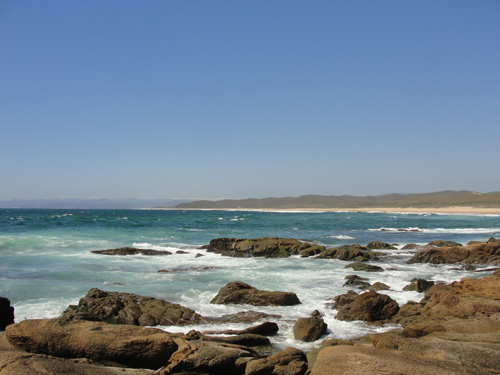 Panorámica de playa Chalacatepec